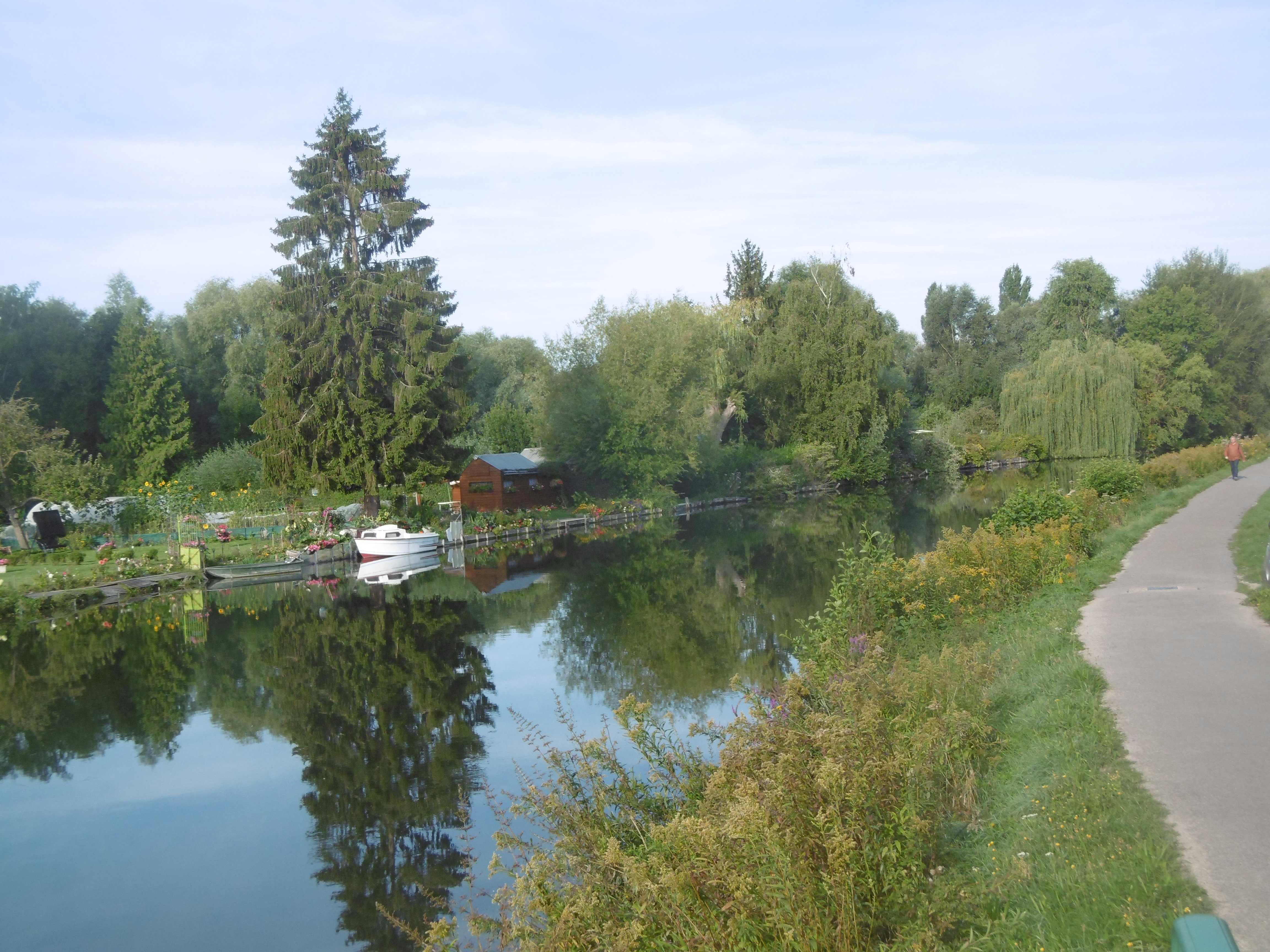 canal de la Somme 3,5 km en amont d'Amiens (commune de Rivery) Véloroute de la Somme